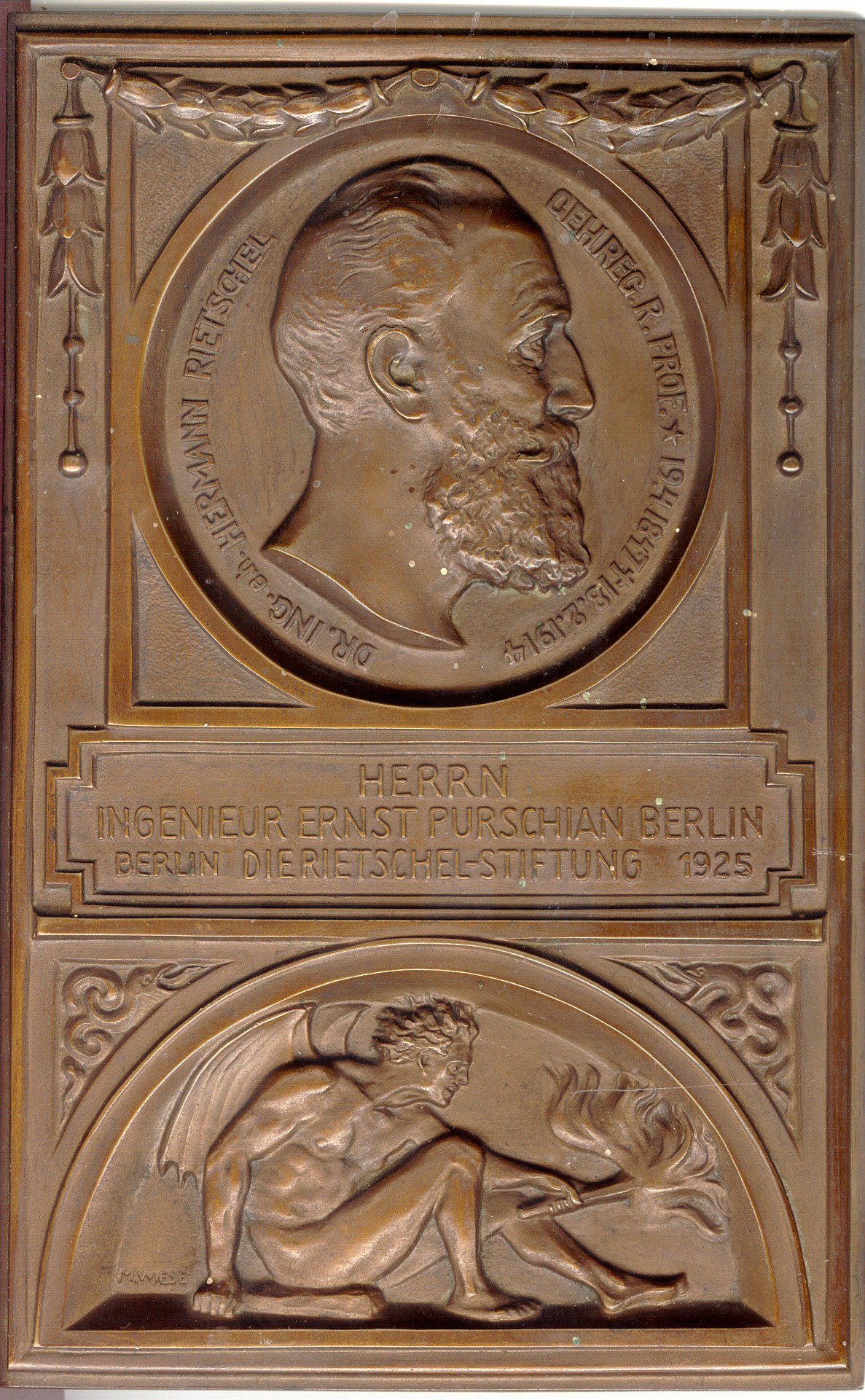 Abbildung der 1925 an den Ing. Ernst Purschian verliehenen Rietschel-Plakette.